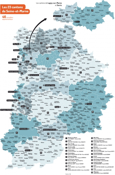 Les 23 nouveaux cantons (à partir de 2015)